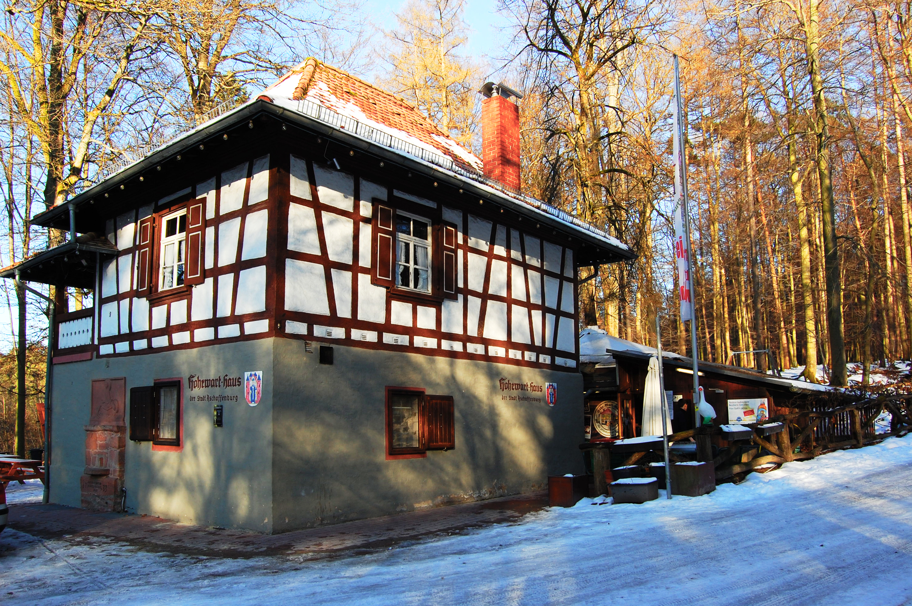 Hohewart-Haus der Stadt Aschaffenburg im gemeindefreien Gebiet der Hohen Wart im Spessart